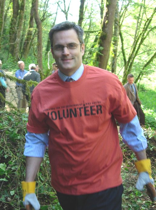 Event: Green space event in Portland, Oregon